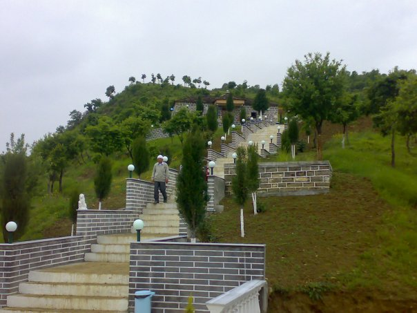 Vend i shenjte ne fshatin Alipostivan afer Kelcyres